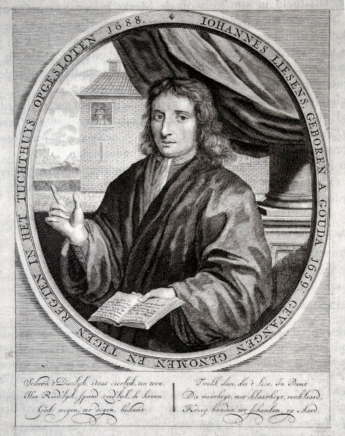 Portretgravure van Johannes Liesens (geb. 1659)